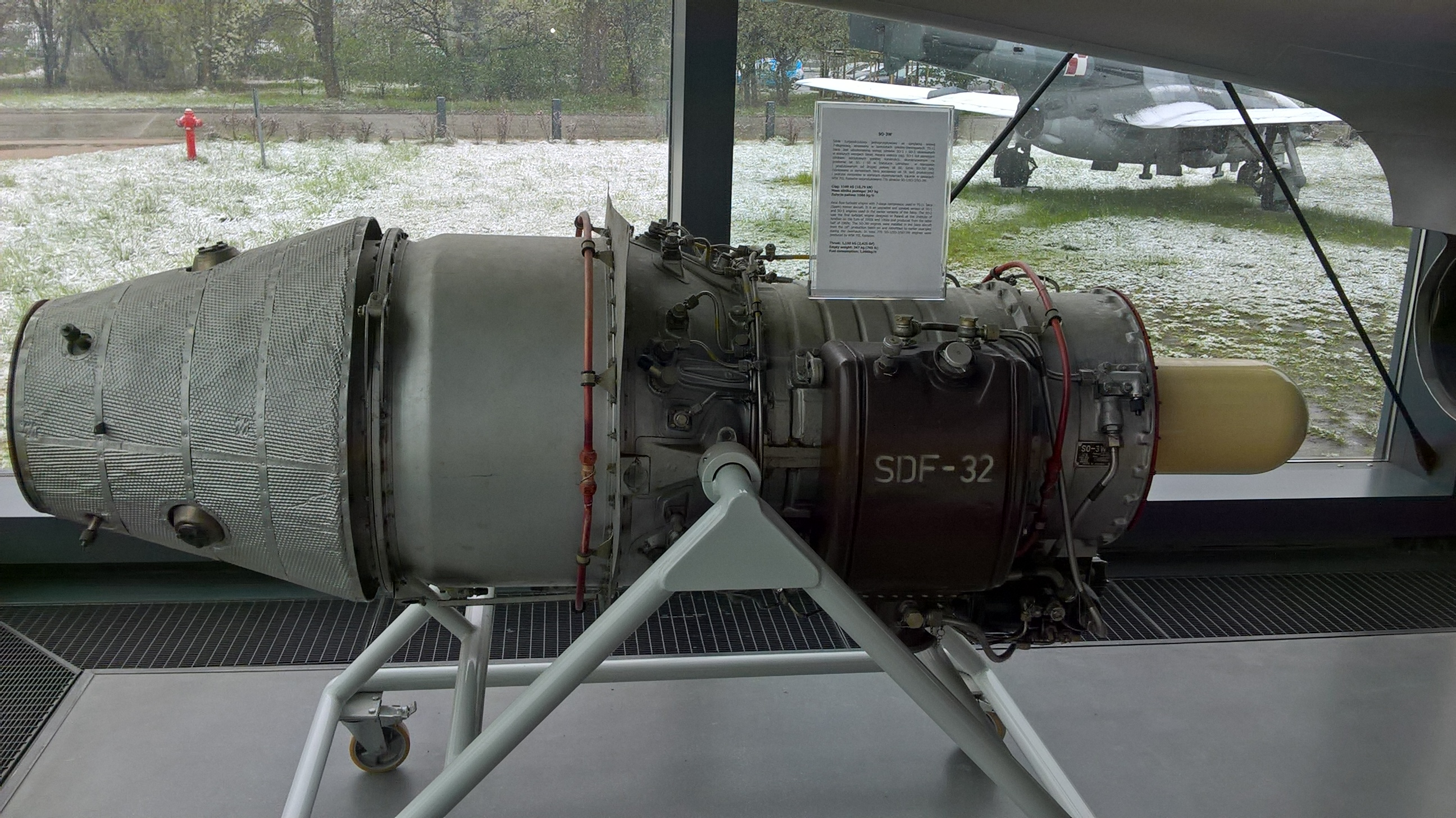 Silnik odrzutowy SO-3W z Muzeum Lotnictwa Polskiego w Krakowie.